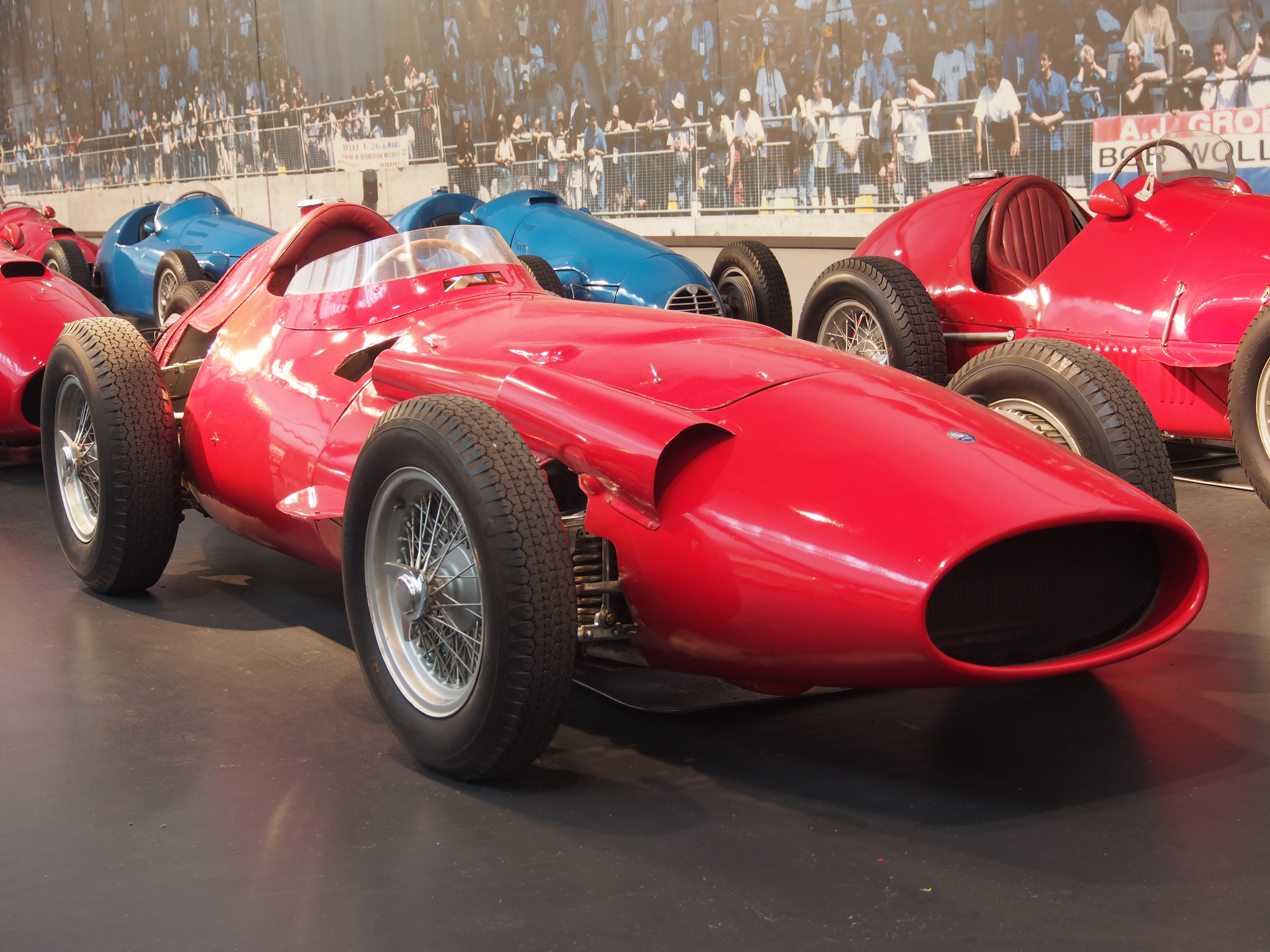 Photographed at the Cité de l’Automobile, Musée national de l’automobile, Collection Schlumpf, Mulhouse, France.